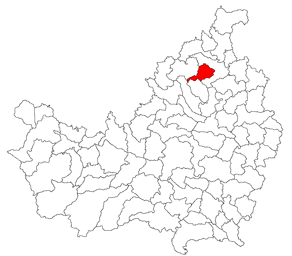 Categorie:Hărţi ale judeţului Cluj